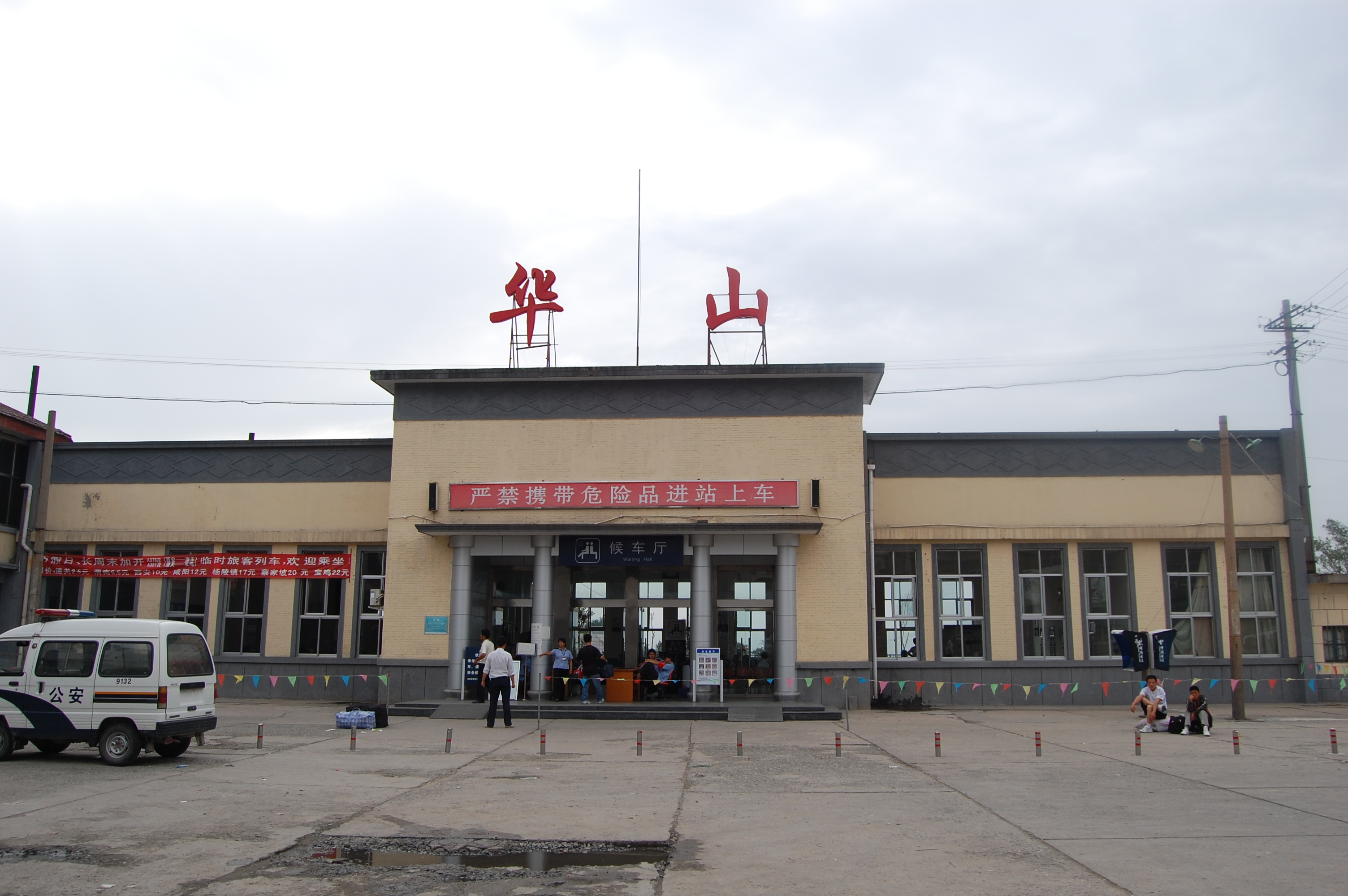 华山火车站